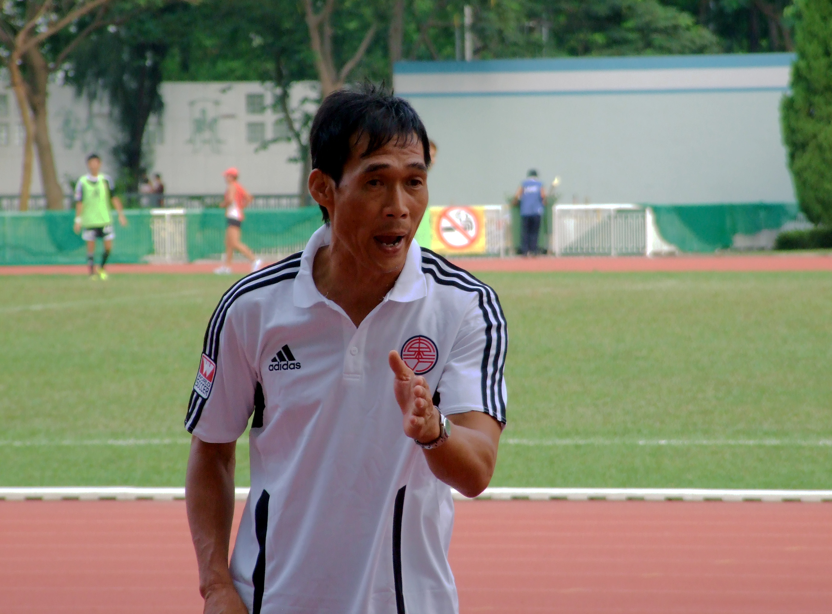 中文（香港）: 李健和